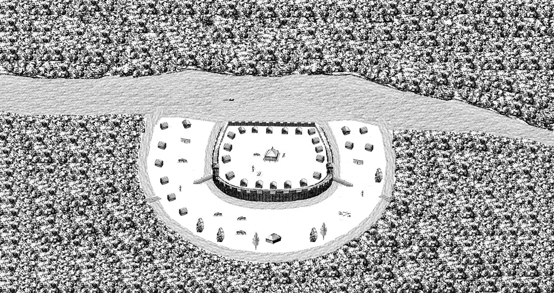 Rekonstruktionsversuch